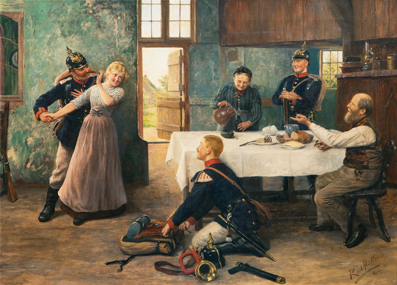 Karl Josef Müller - Der fröhliche Abschied, Öl auf Leinwand, 70 x 93 cm, r. u. sign. u. dat. Karl Müller Hmbg. 1899